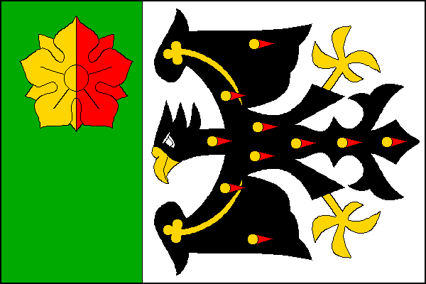 vlajka, Mackovice, okres Znojmo